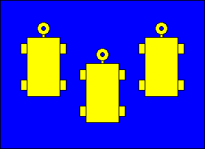 Vlag van de gemeente Schelle